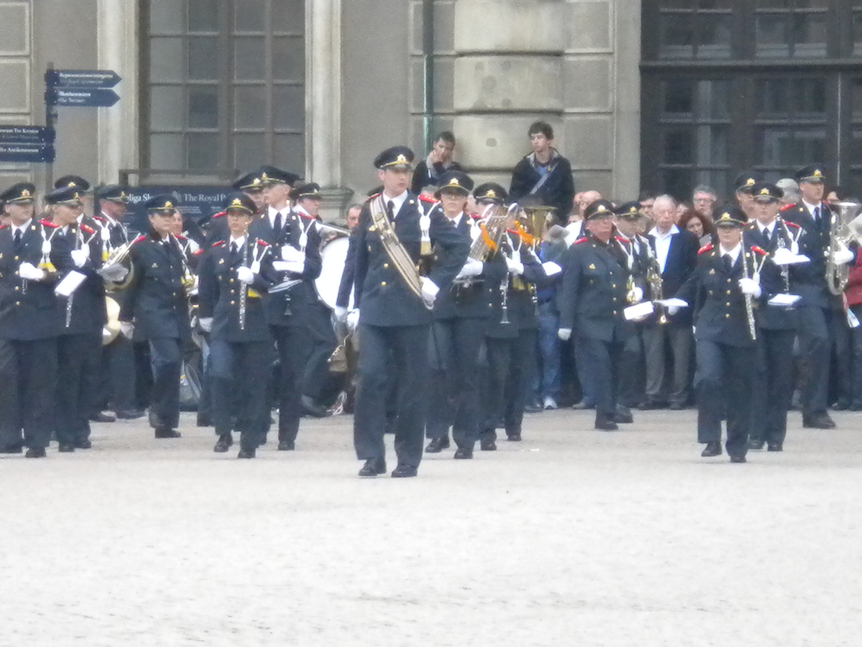 Umeå Hemvärnsmusikkår under högvaktsavlösningen 15/8-11.